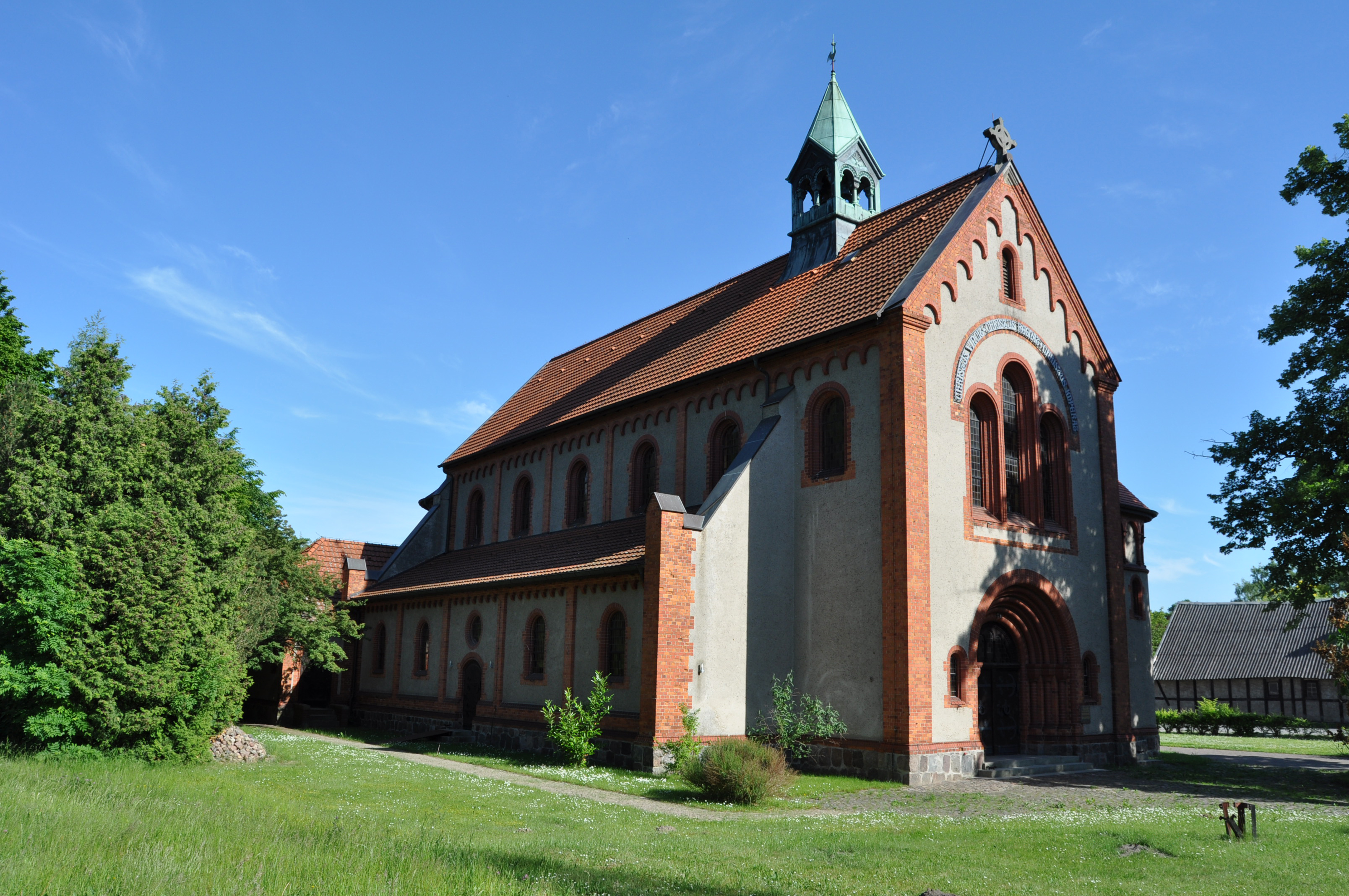 Pfarrkirche Salvator Anklam